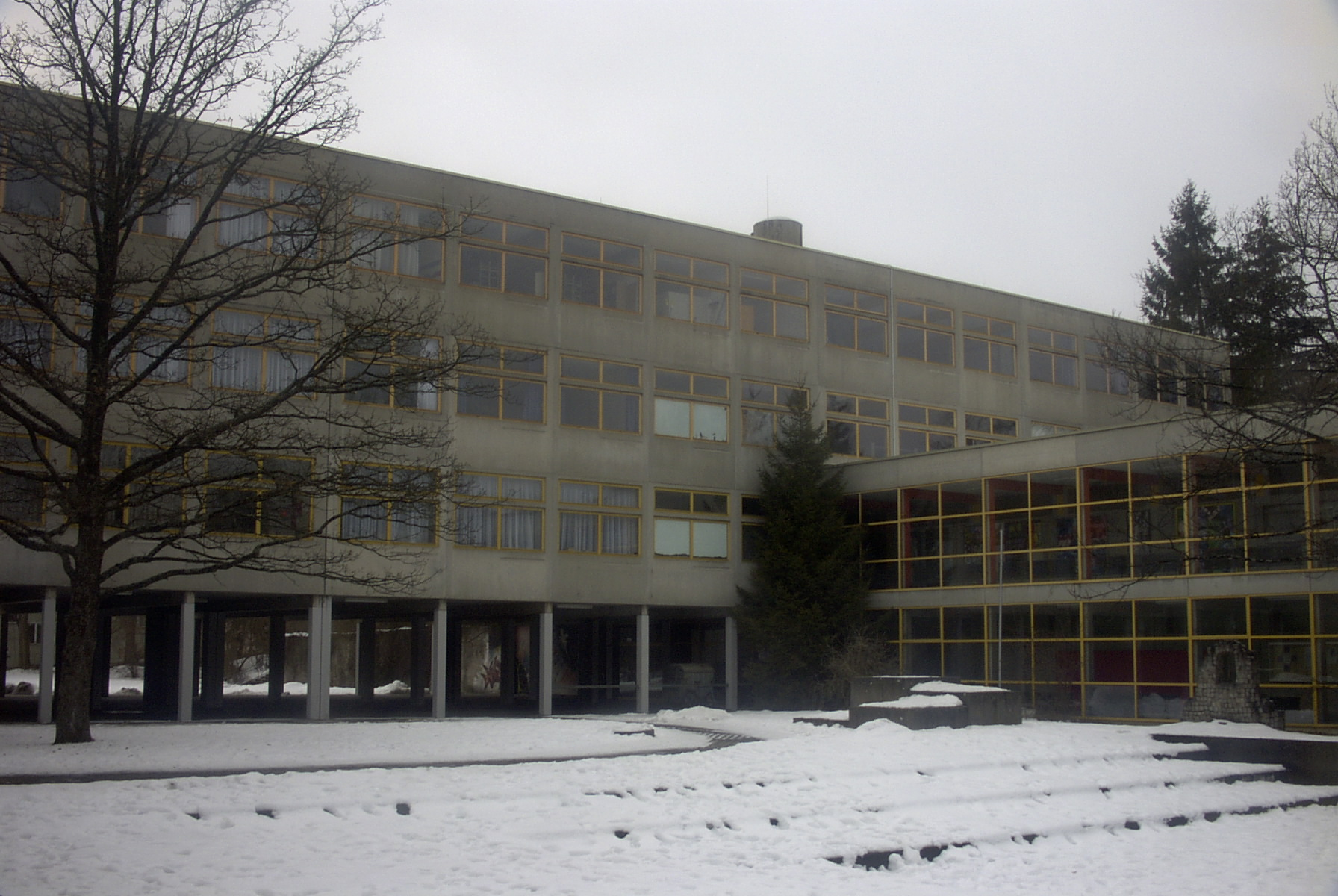 Gymnasium am Deutenberg - Innenhof, Villingen-Schwenningen, Deutschland